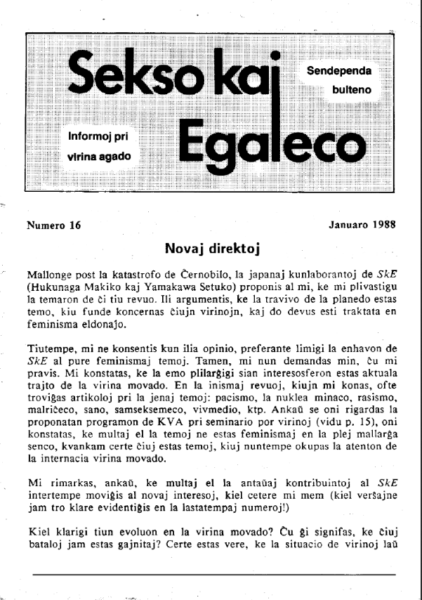 Gazeto sekso kaj egaleco de 1988